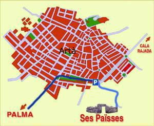 Bildbeschreibung: Lageplan Ses Païsses (Artà) Zeichner:Tomás Ribot (junior) Datum: 2004 Sonstiges: Zeichnung wurde mir von Tomás für Buch und Artikelserie gezeichnet, er unterstützt auch die Ausgrabungen vor Ort jedes Jahr als freiwilliger Helfer.--Juan 04:15, 11. Mai 2006 (CEST)